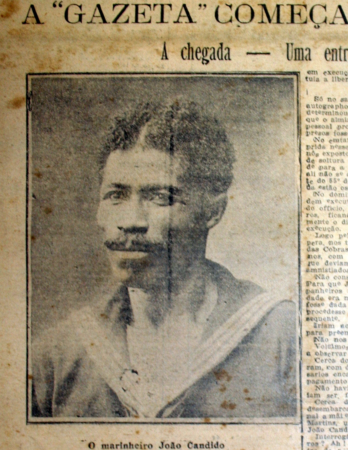 Jornal Gazeta de Notícias de 31 de dezembro de 1912, publicada, manchete, há mais de 100 anos. Domínio Público.